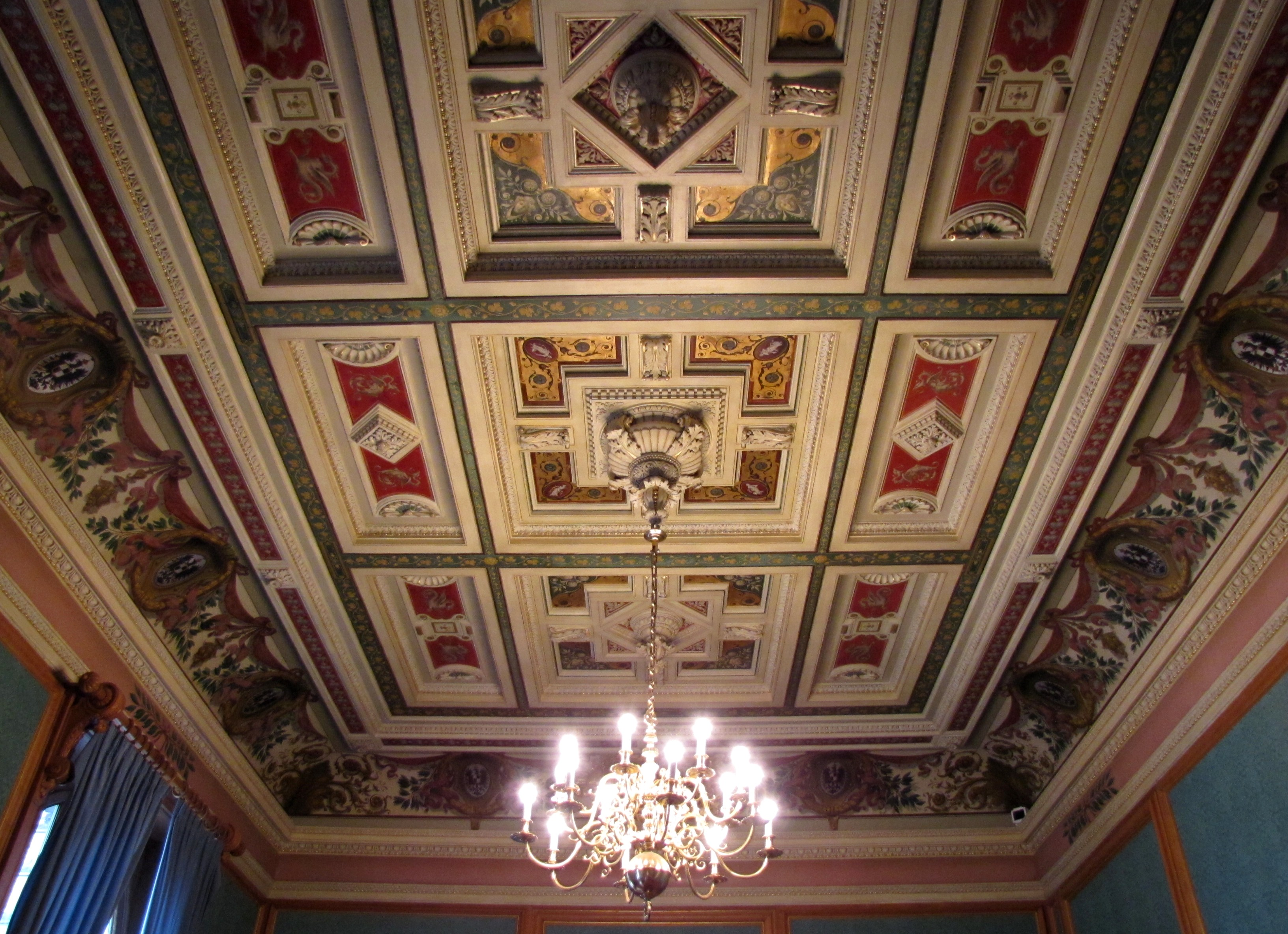 Alsace, Bas-Rhin, Strasbourg, Ancien Palais impérial allemand ou Kaiserpalatz (1888), dit Palais du Rhin, 1-2-3 place de la République: Plafond d'un des salons de réception. .